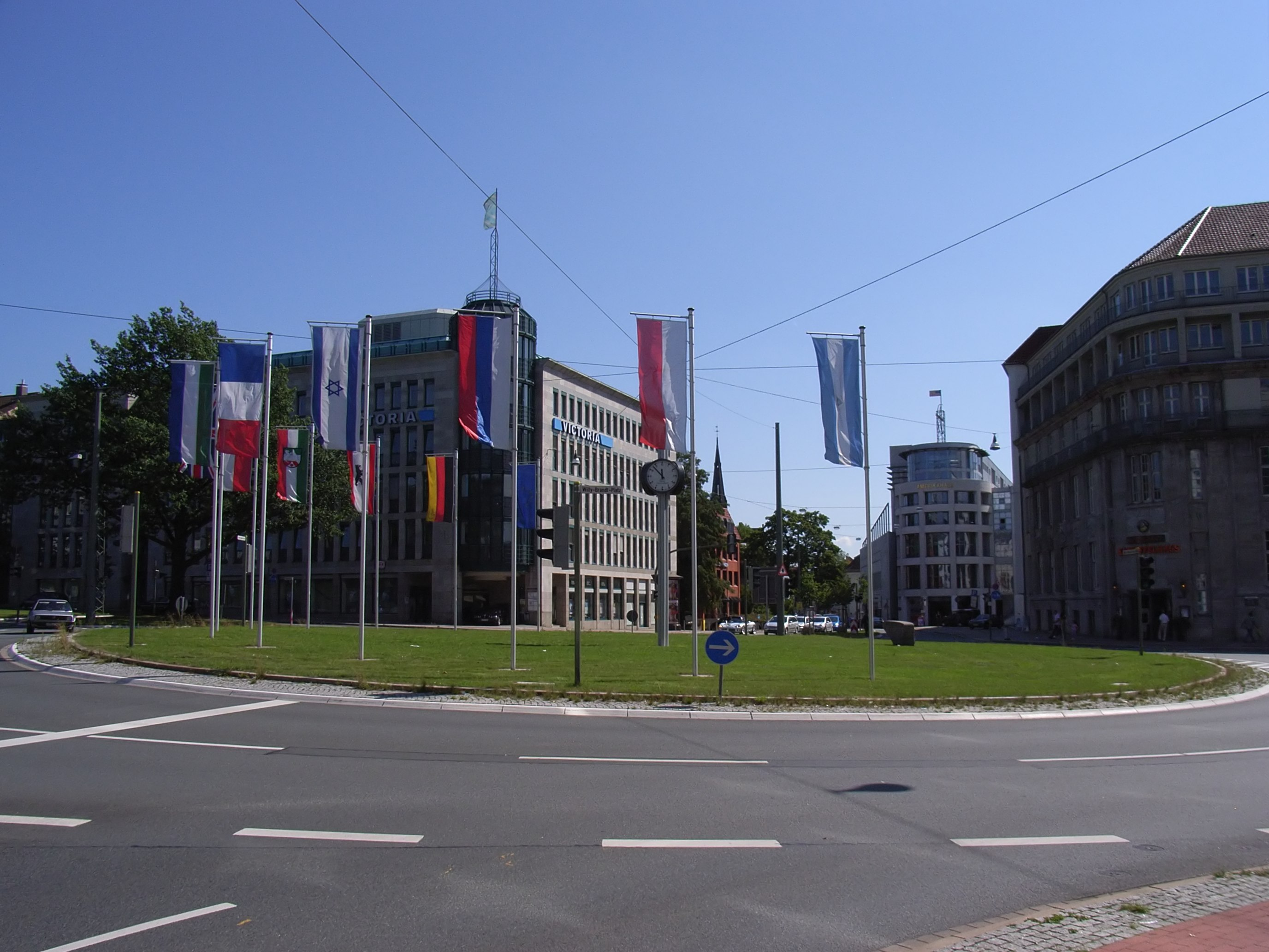 Bielefeld, Deutschland: Willy-Brandt-Platz, Blick in Richtung Paulusstraße.